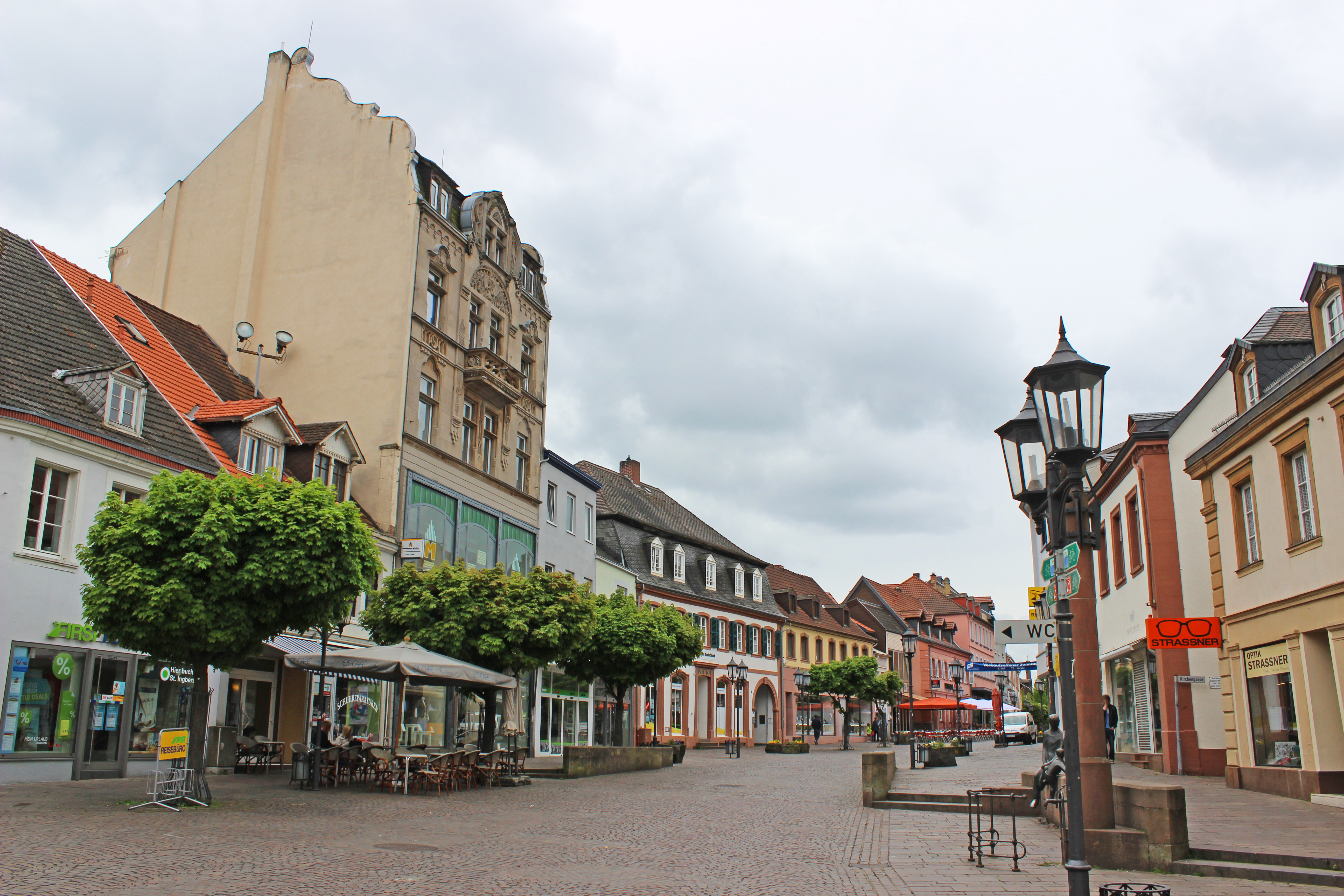 Fußgängerzone Kaiserstraße, St. Ingbert, Saarland